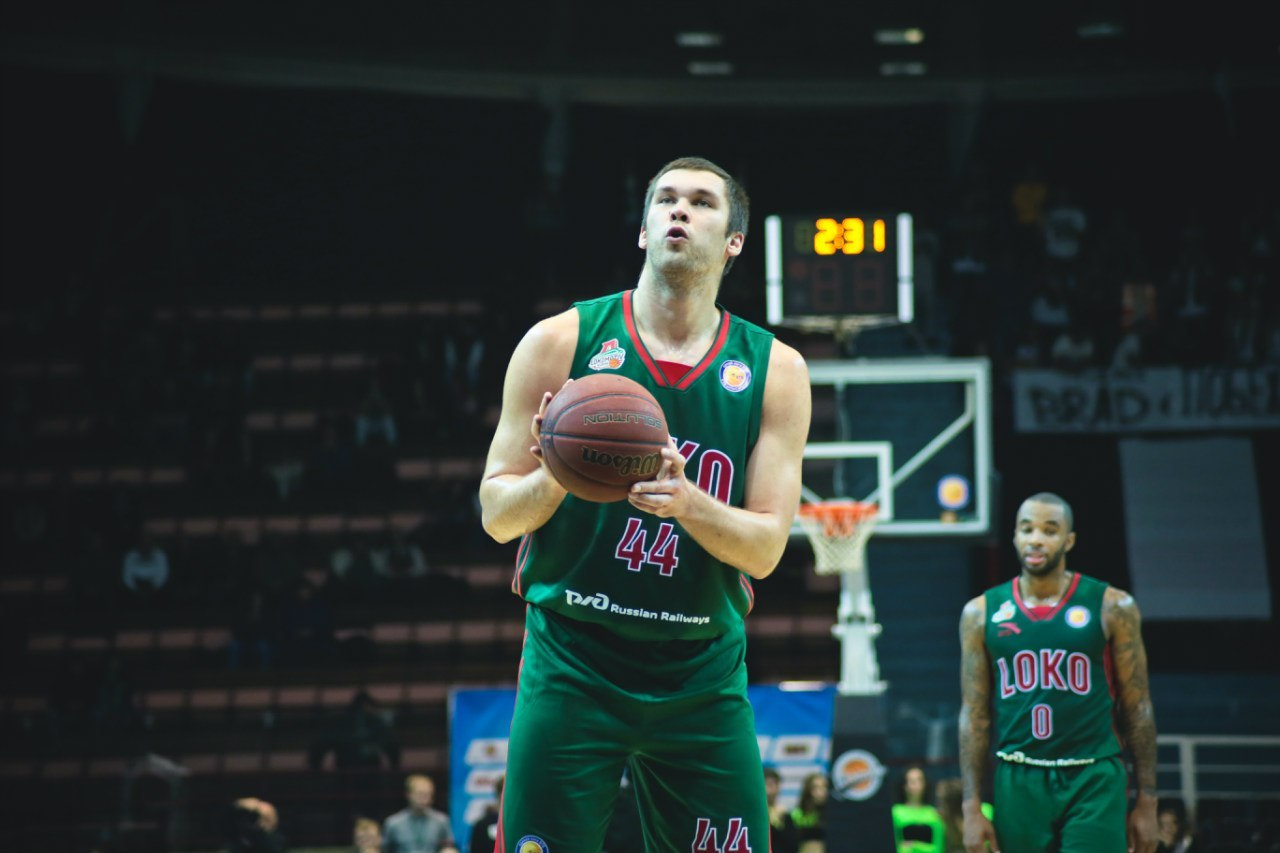 Kyrylo Fesenko